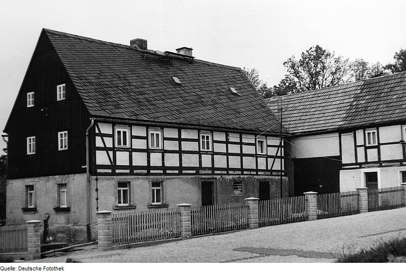 Original image description from the Deutsche Fotothek Tharandt-Grillenburg. Alte Schmiede gegenüber von Gasthof und ehem. Mühle, am Grunder Weg